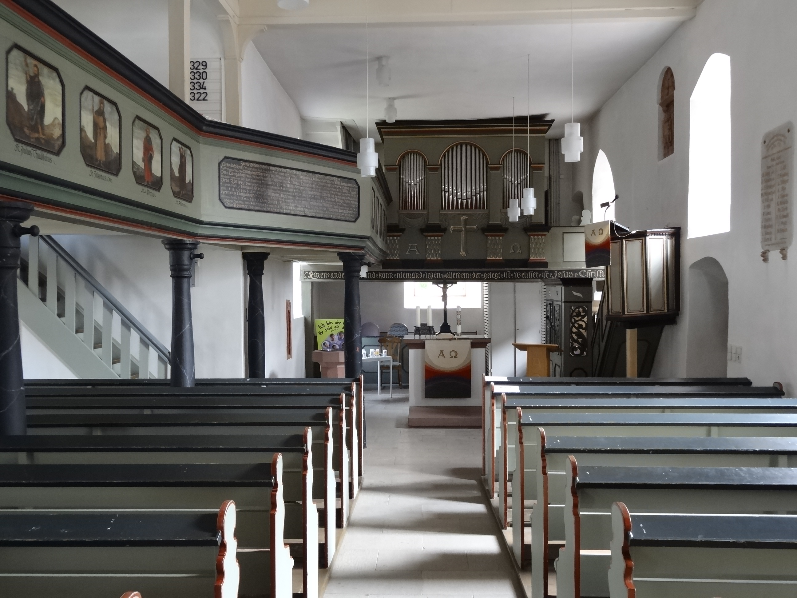 Evangelische Kirche Pohl-Göns